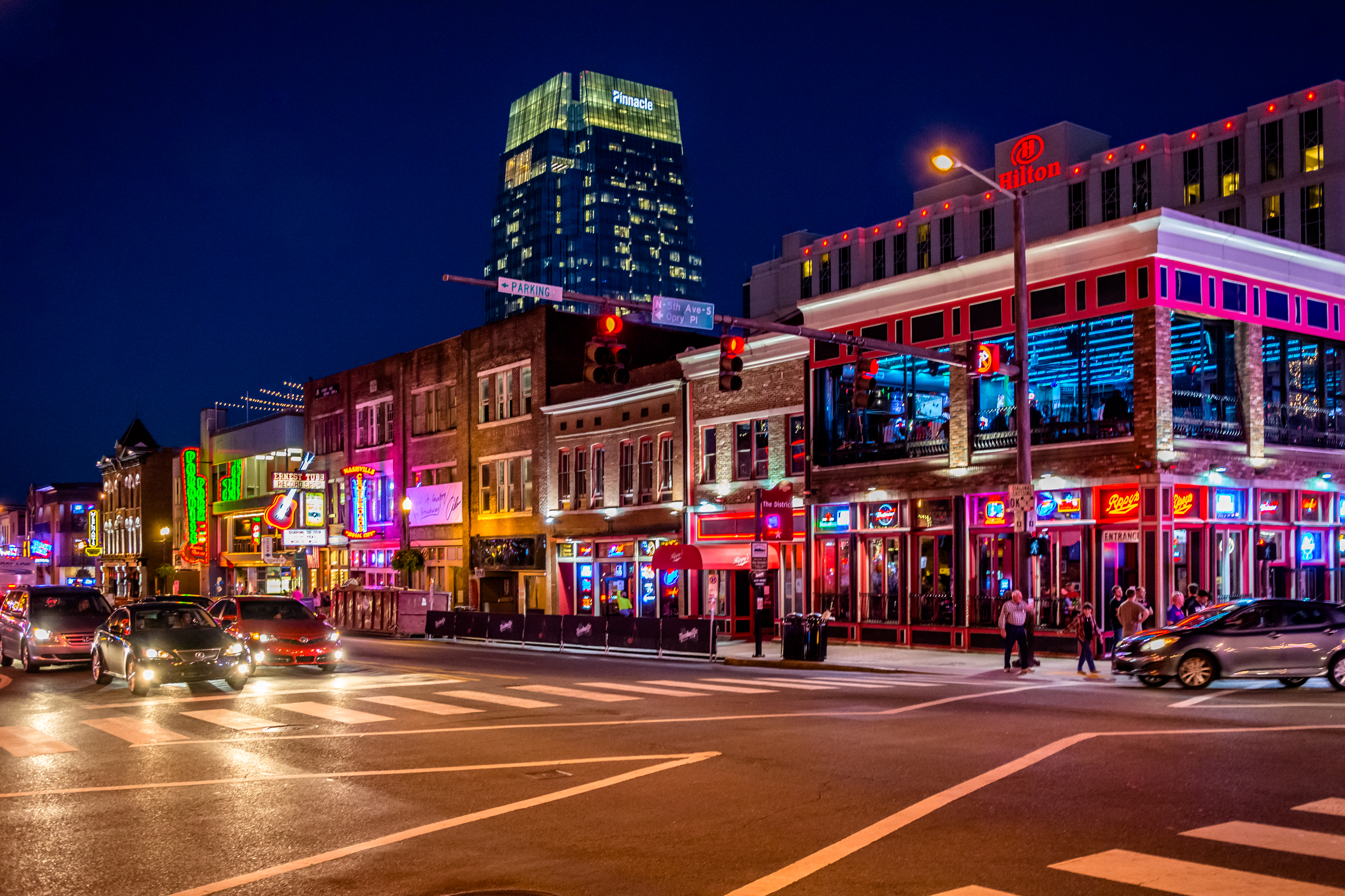 Nashville, Tennessee, USA